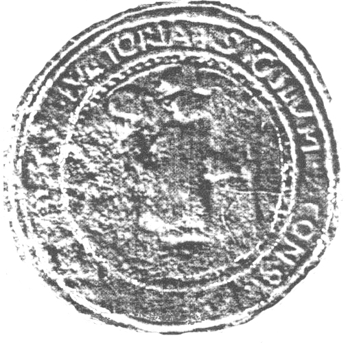 Lutsk emblem 1550-1650